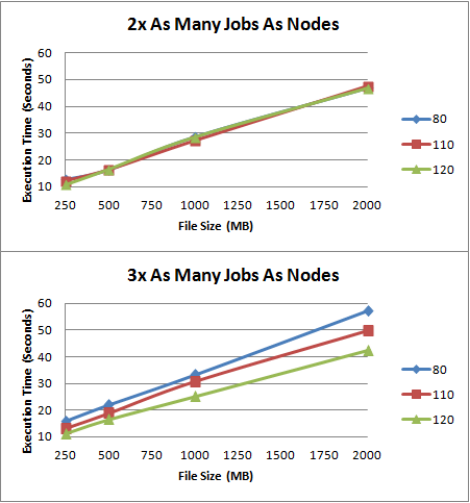 Graphique sur le temps de traitement d'un noeud d'un cluster en fonction de sa température